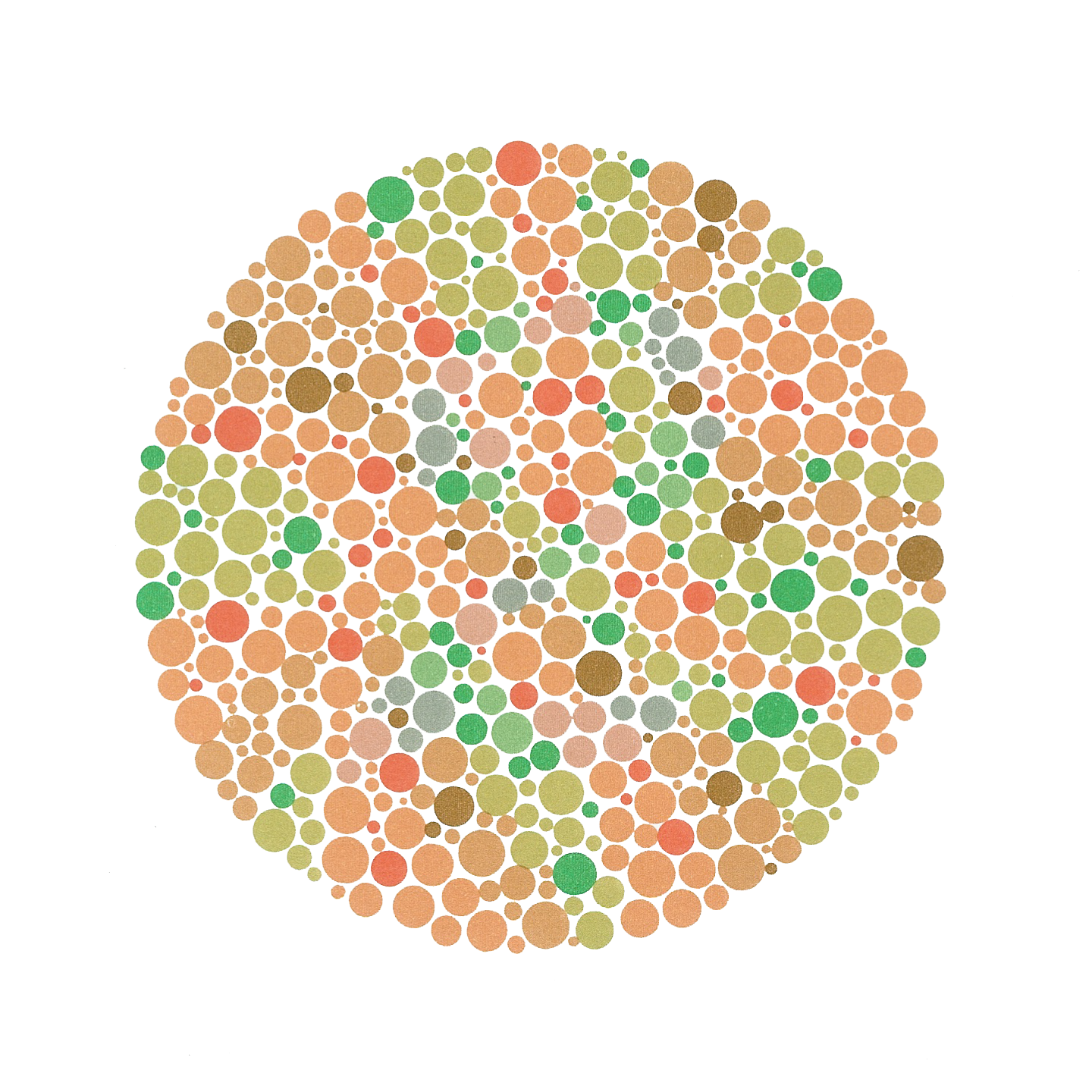 Ishihara Plate #19